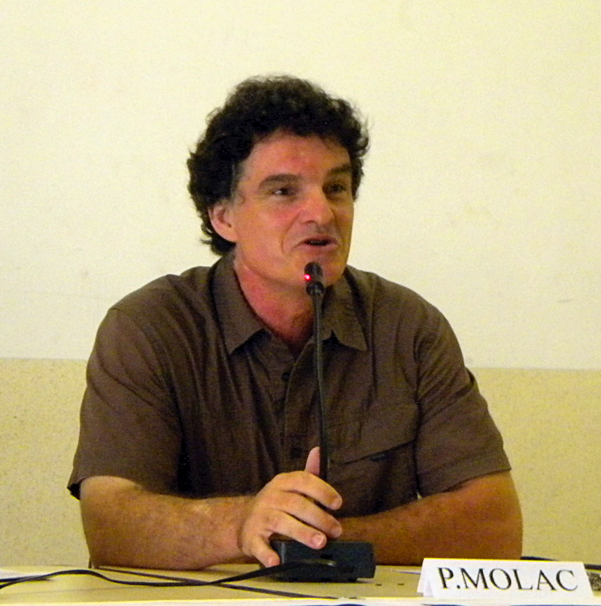 Paul Molac e kendalc'h Régions et Peuples solidaires e miz Eost 2012.